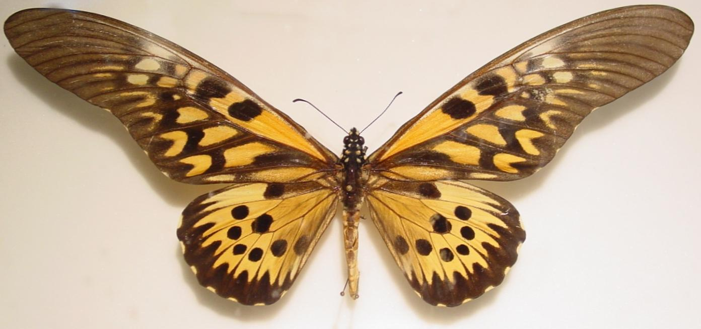 self made. Species: Papilio antimachus